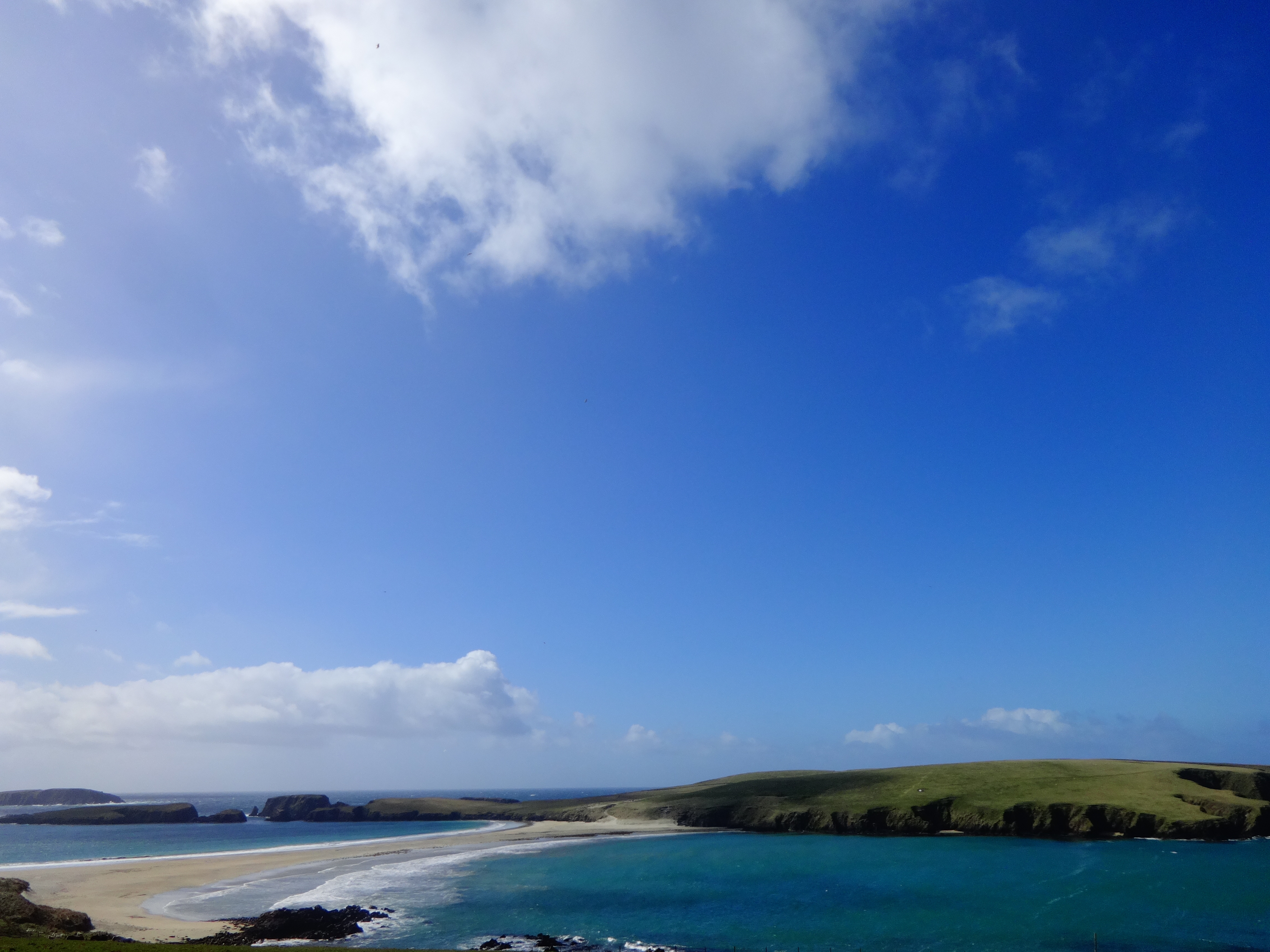 Vue sur Saint-Ninian's Isle